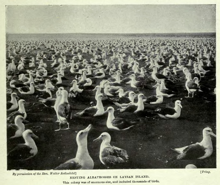 Laysan Albatross colony on Laysan Island